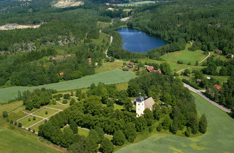 Bilden är tagen mot (väderstreck): NNO Motiv: Grödinge kyrka Nyckelord: Flygbilder, Riksintressen Kategori: KyrkomiljöBilden är tagen mot (väderstreck): NNO.